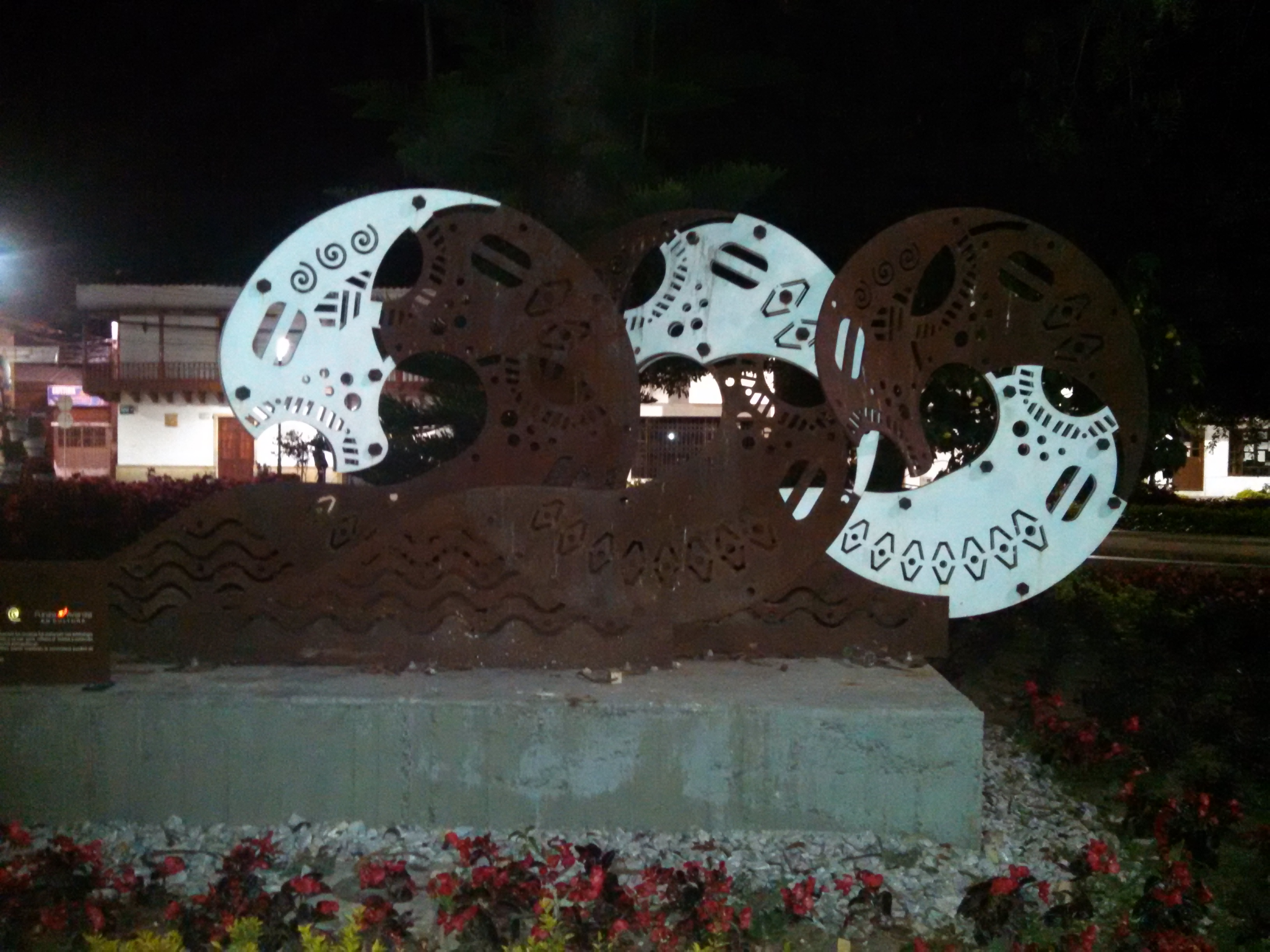 GUAMUHYCA, como solían llamarle los muiscas fue elaborada con sumbologia de efectos del periodo fosfeno y en sus giros reflejan el avance y la evolución de nuestra ciudad desde épocas prehispánicas; así mismo nuestro emblemático animal ,manifiesta la convivencia pacifica de nuestros ancestros. Autor: Wilfredo Barbosa Año: 2015